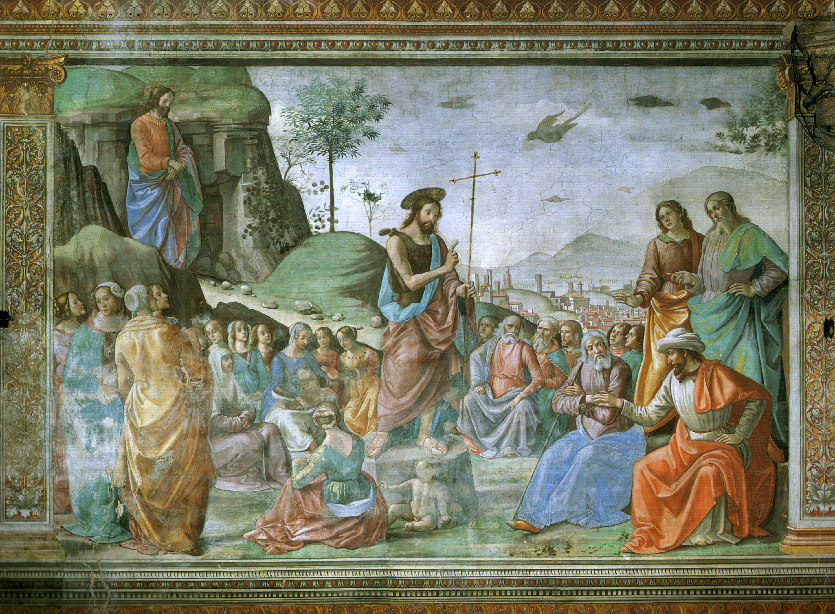 cappella tornabuoni frescoes in florence